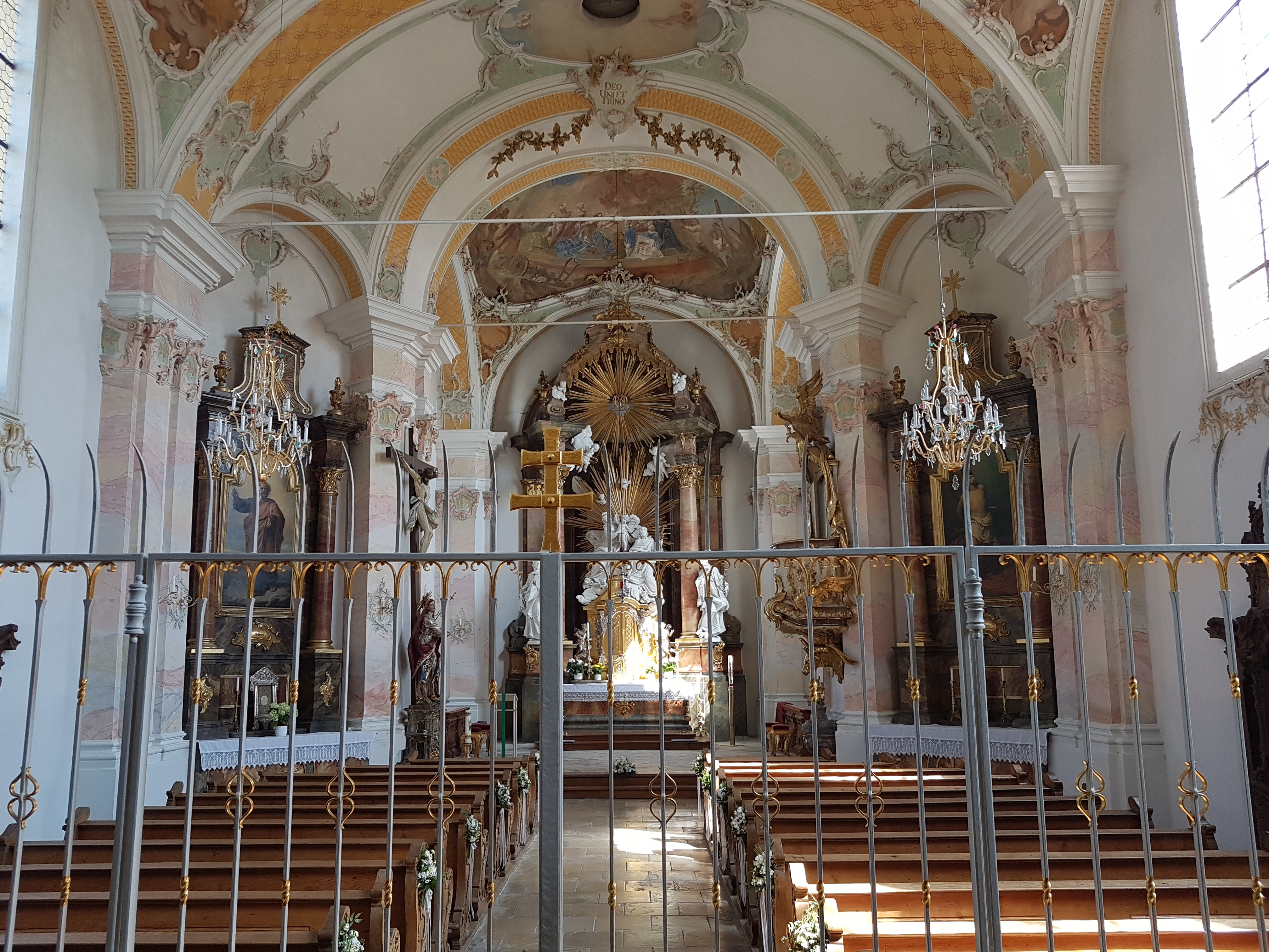 Starnberg, alte Pfarrkirche St. Josef, Innenraum mit der wertvollen Rokoko-Ausstattung.